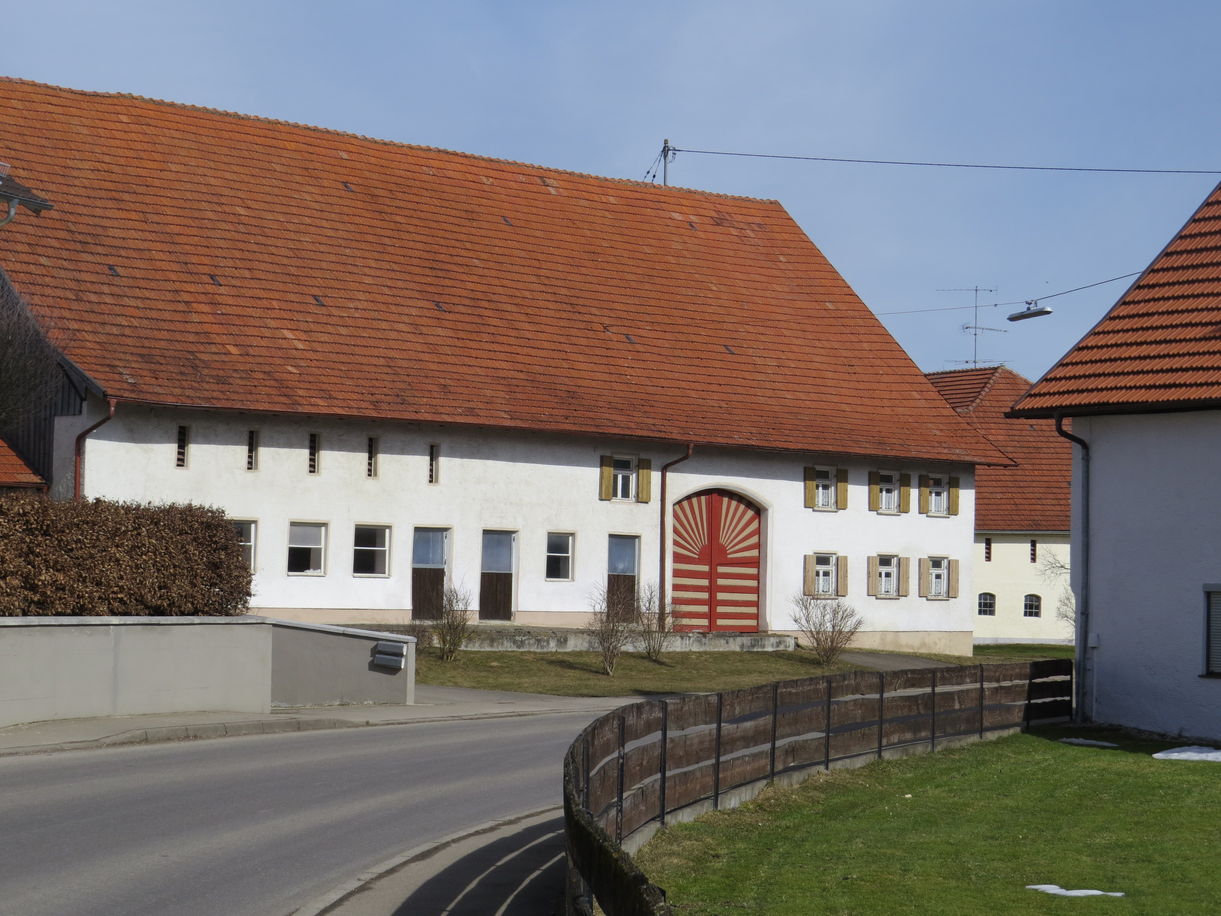 Bauernhof in Hawangen